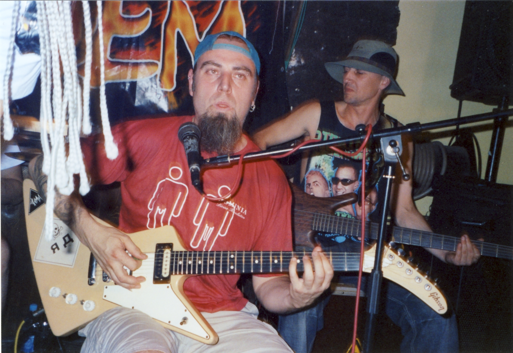 Boney NEM bei dem Konzert im Klub „Schwein“ (Moskau, 28.07.07)